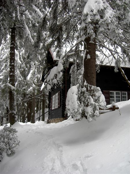 Cabana Noica in Păltiniş, Romania